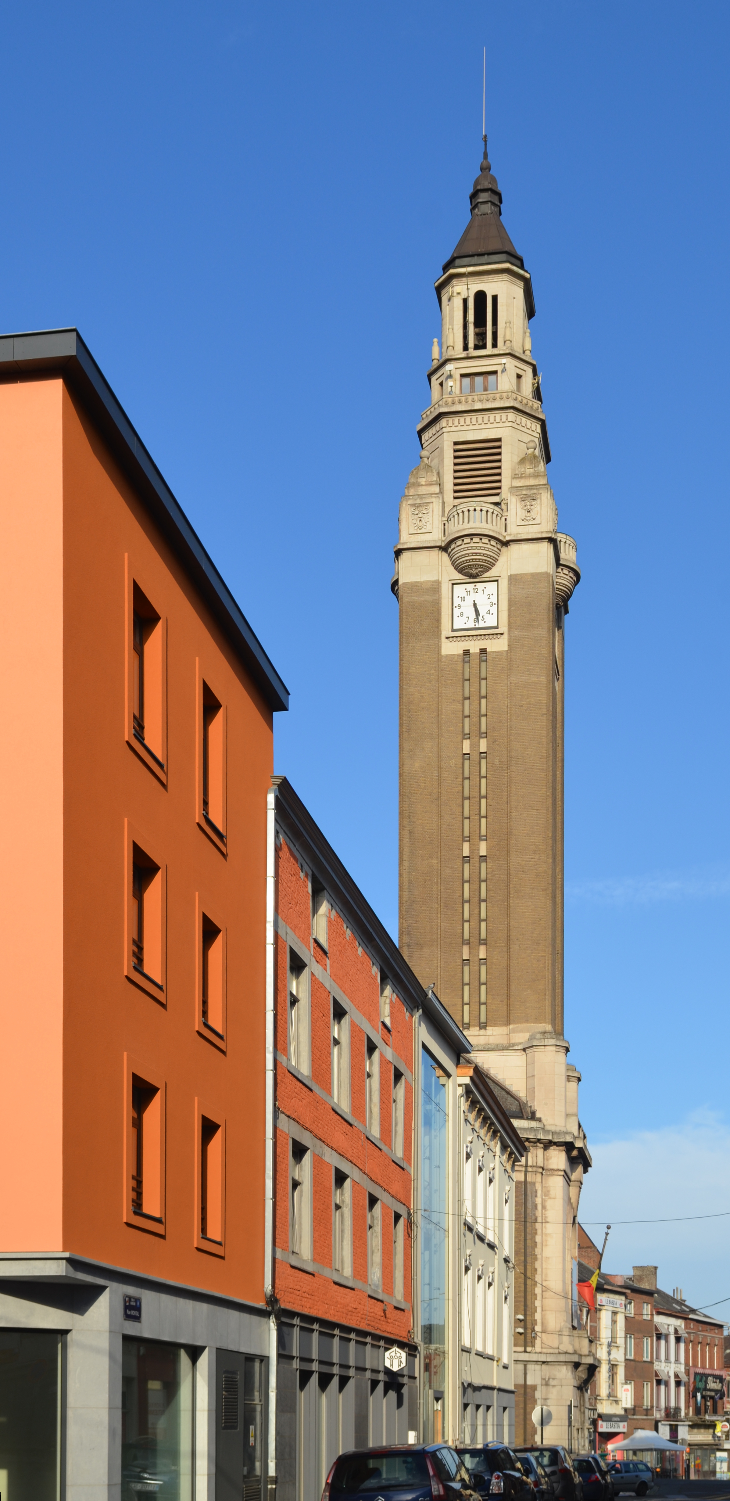 Charleroi (Belgique) - Beffroi de l'hôtel de ville.